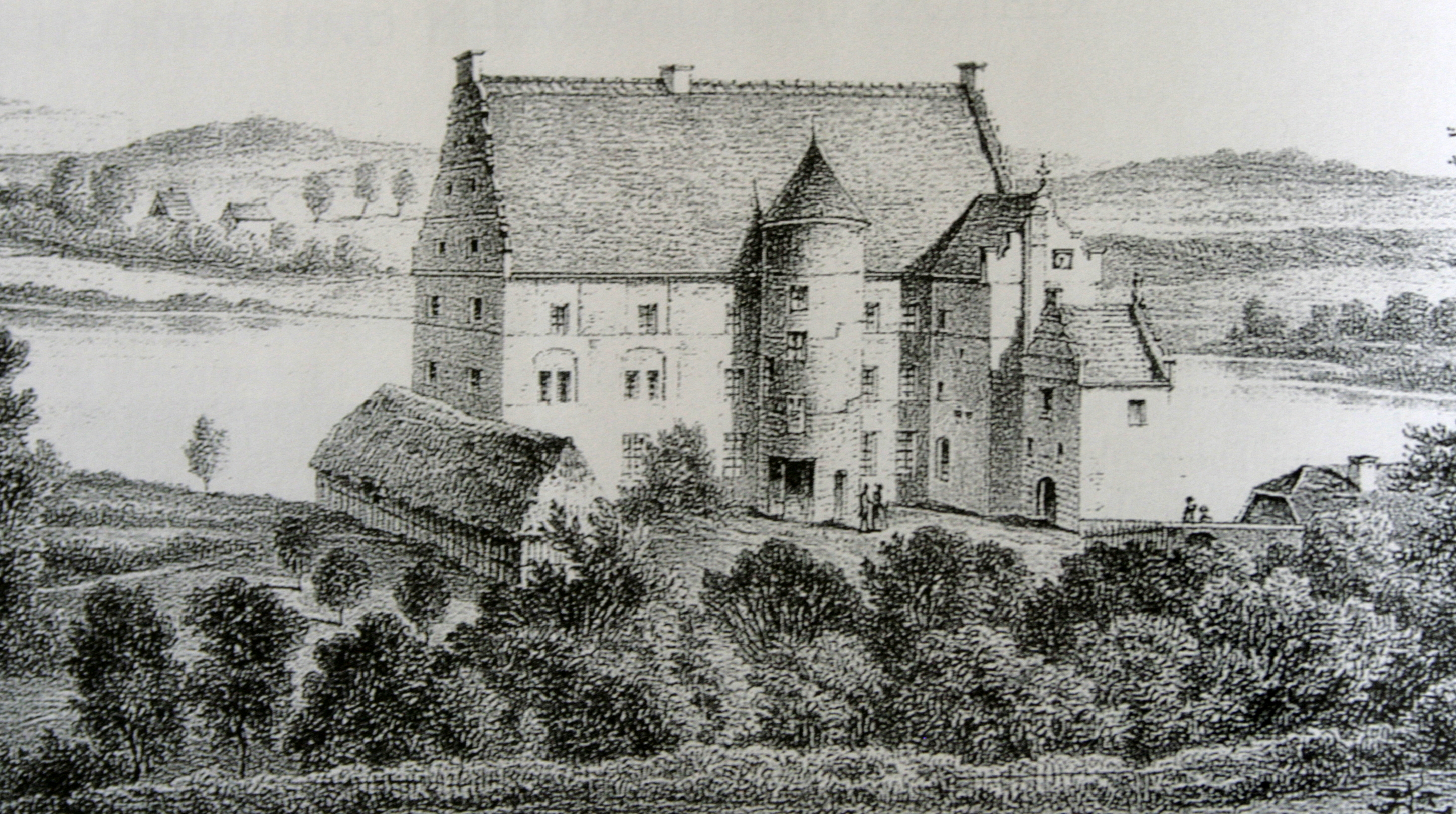 Schloss Ulrichshusen bei Schwinkendorf, Mecklenburg-Vorpommern, Deutschland, auf einer Lithographie um 1820